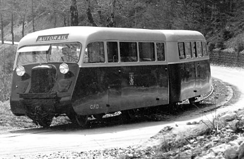 Autorail Renault NF modernisé, en 1936.